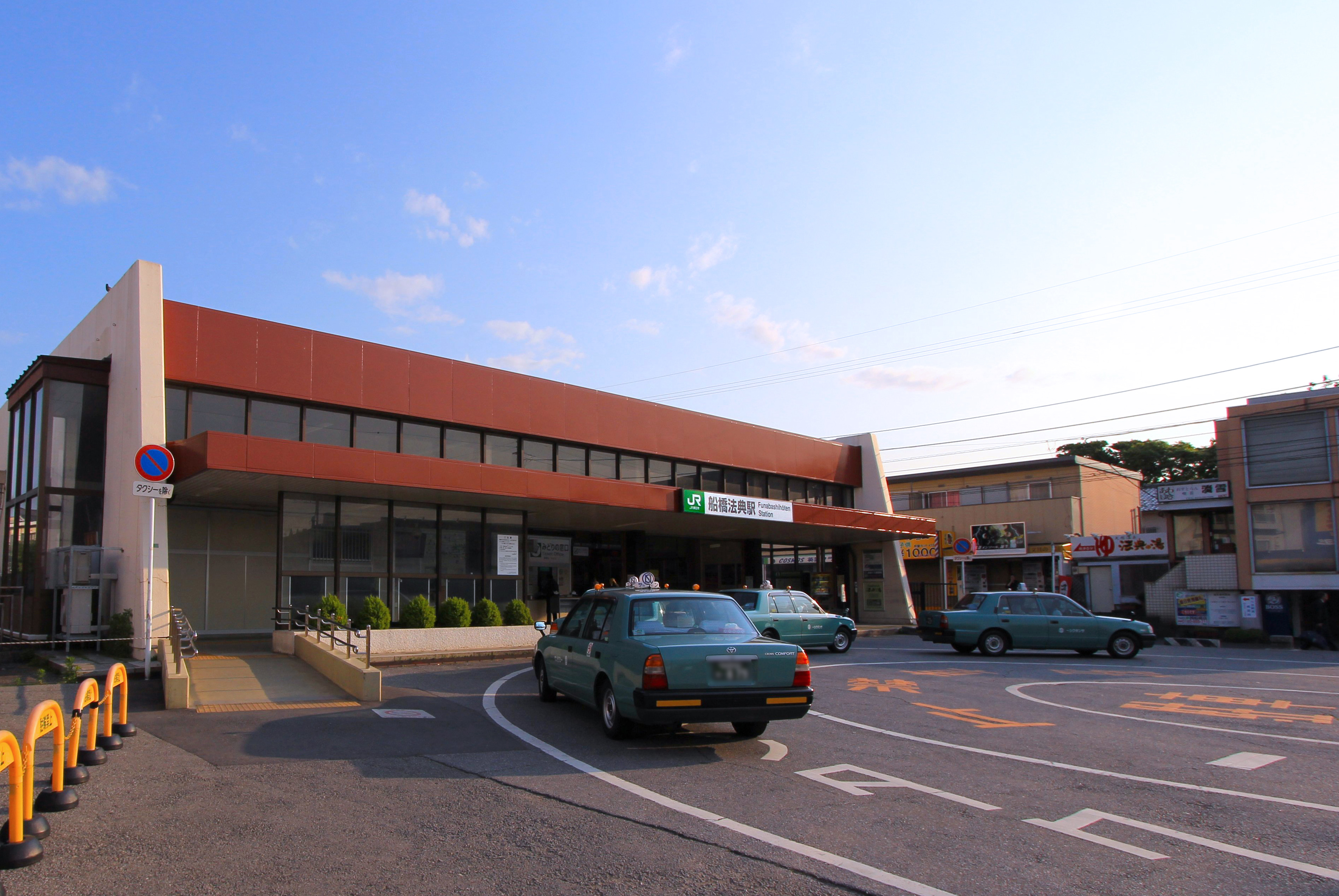 船橋法典駅